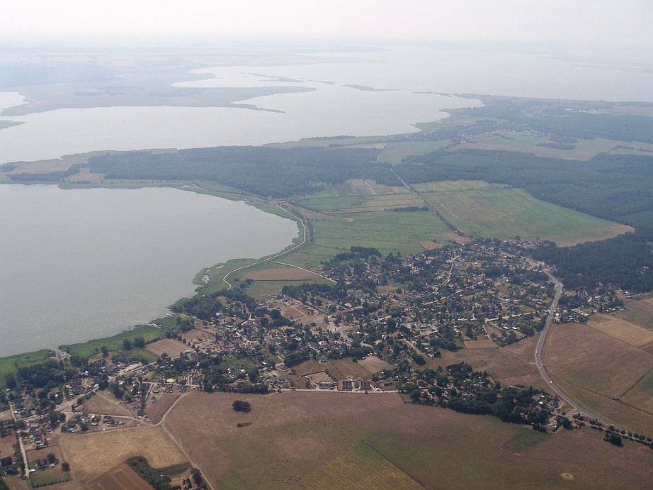 Luftbildaufnahme der Orte Wieck a Darß (Vordergrund) und Born a. Darß (Hintergrund)